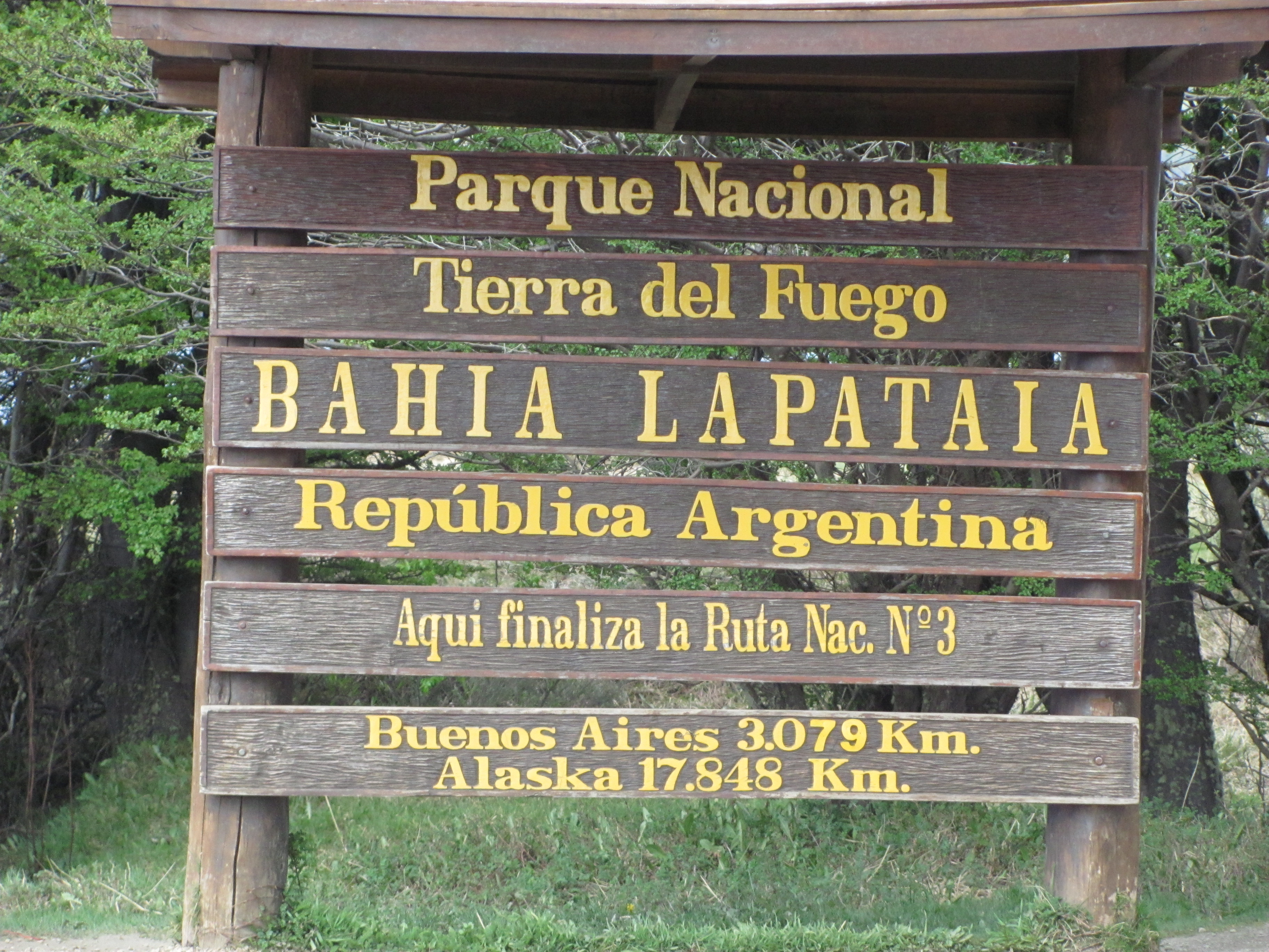 Tierra del Fuego, Parque Nacional. Fin de la Ruta 3, a 3079kms. de Buenos Aires